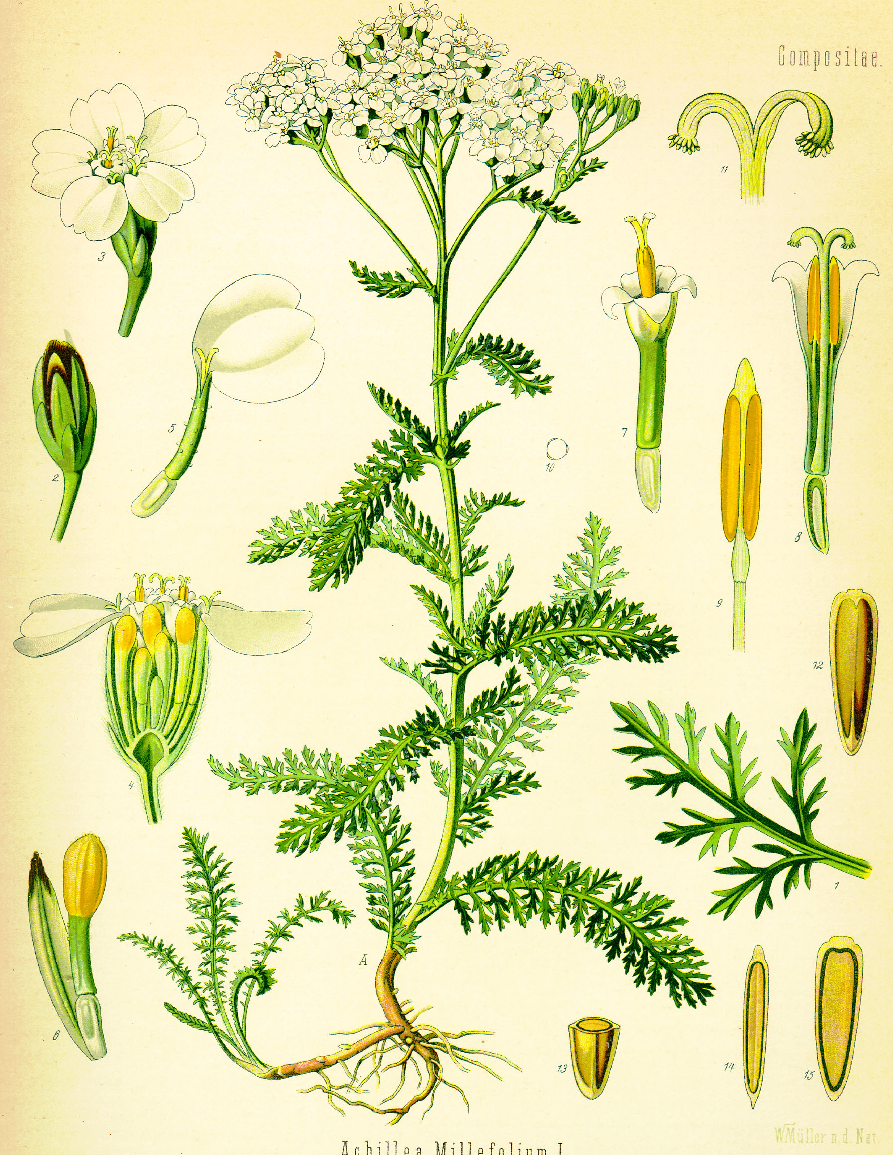 Schafgarbe, Abbildung aus Franz Eugen Köhler: "Köhlers Medizinal-Pflanzen in naturgetreuen Abbildungen und kurz erläuterndem Texte". A blühende Pflanze, natürl. Grösse; 1 Blattabschnitt, vergrössert; 2 ungeöffnetes, 3 geöffnetes Blüthenkörbchen, desgl.; 4 dasselbe im Längsschnitt, desgl.; 5 Randblüthe, desgl.; 6 ungeöffnete Scheibenblüthe mit Spreublättchen, desgl.; 7 geöffnete Scheibenblüthe, desgl.; 8 dieselbe im Längsschnitt, desgl.; 9 einzelnes Staubgefäss, desgl.; 10 Pollen, desgl.; 11 oberer Theil des Griffels mit den beiden Narben, desgl.; 12 Frucht, desgl.; 13 dieselbe im Querschnitt; 14, 15 dieselbe im Längsschnitt von verschiedenen Seiten, desgl.